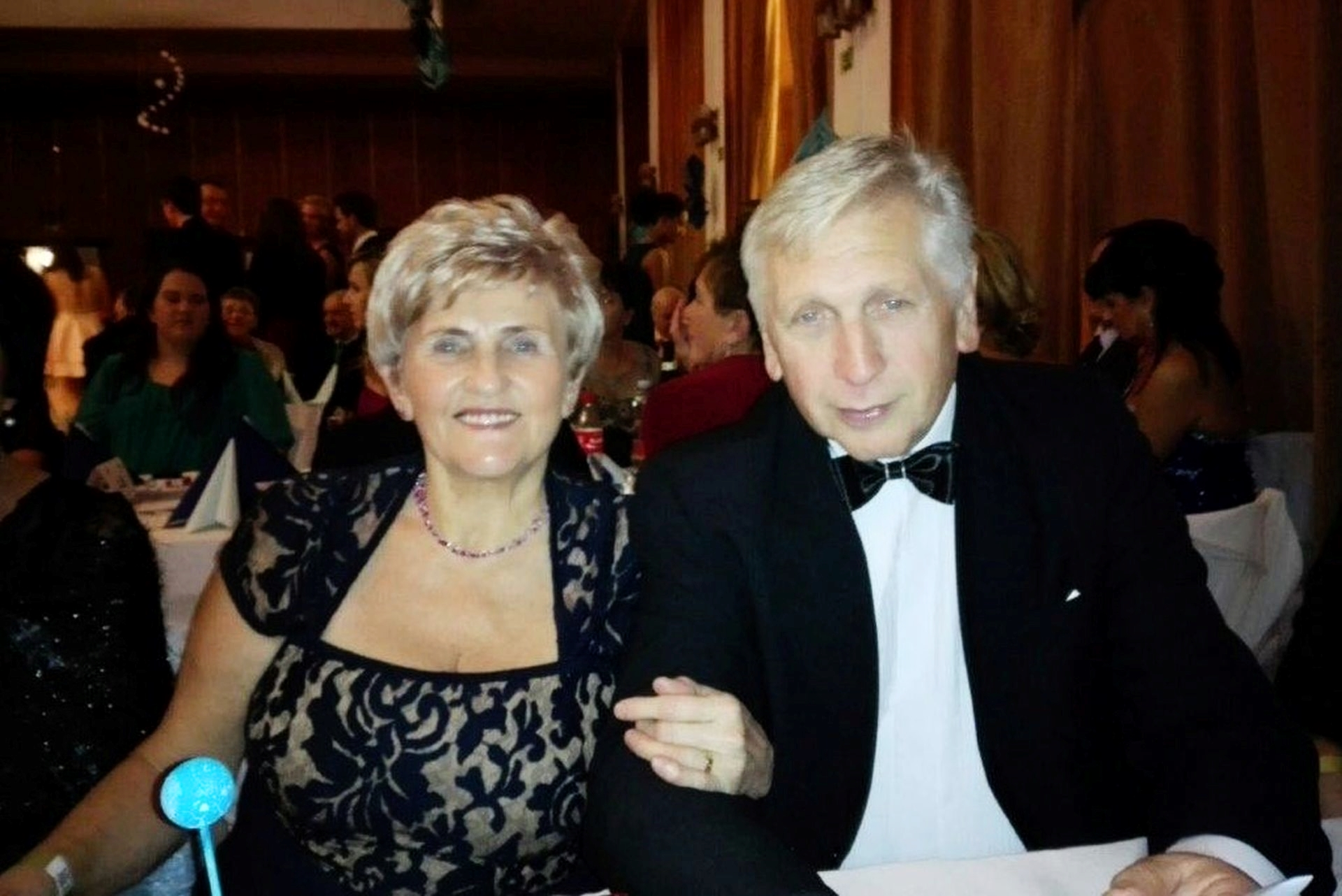 Květina a Jiří Halberštátovi